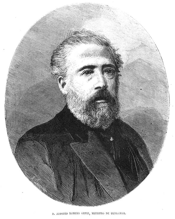 Retrato de Antonio Romero Ortiz, publicado en la revista española La Ilustración Española y Americana.